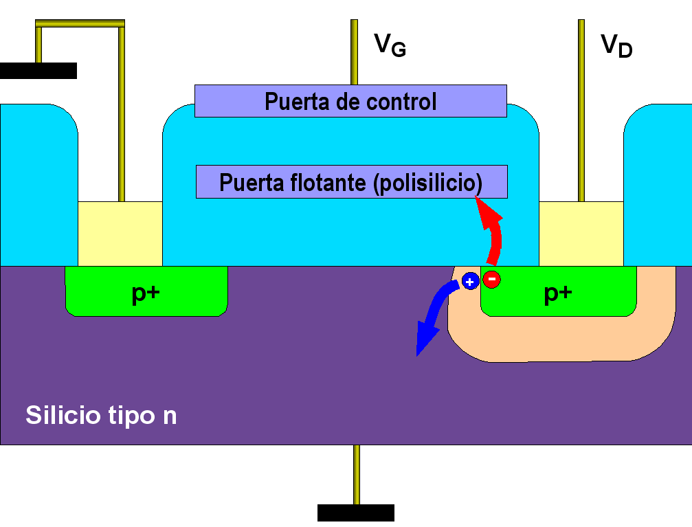 Estructura SAMOS, según Lizuka